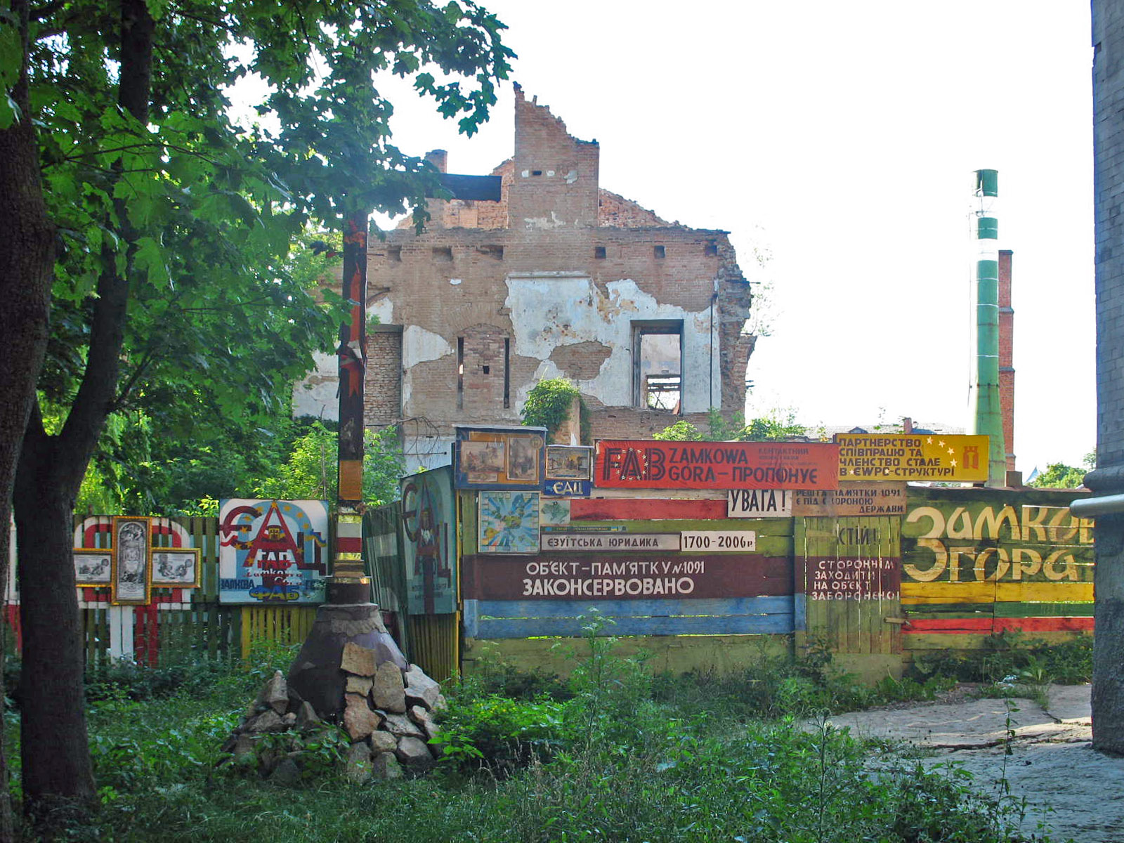 Келії єзуїтського монастиря, Житомир, вул. Черняховського, 12